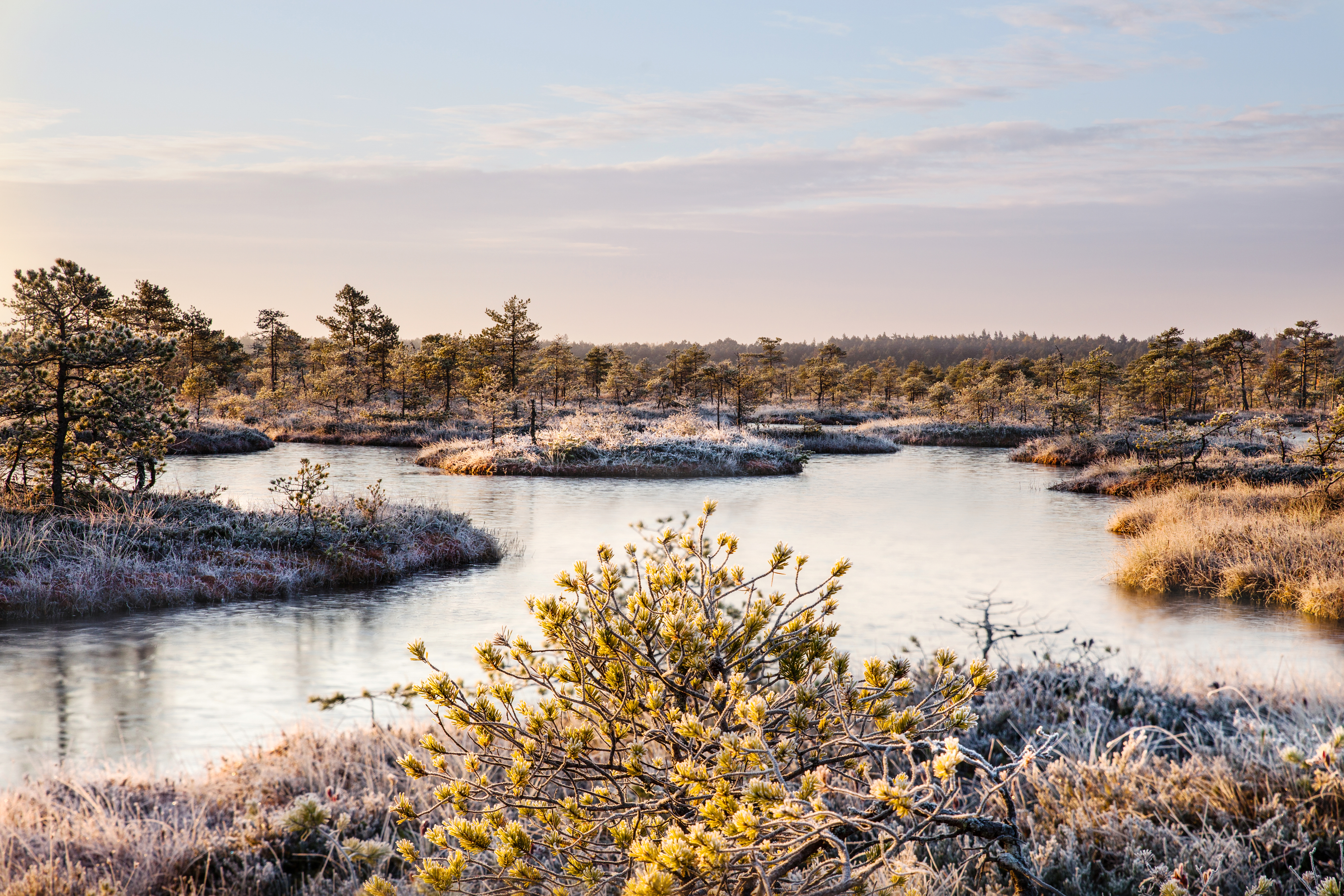 Endla looduskaitseala